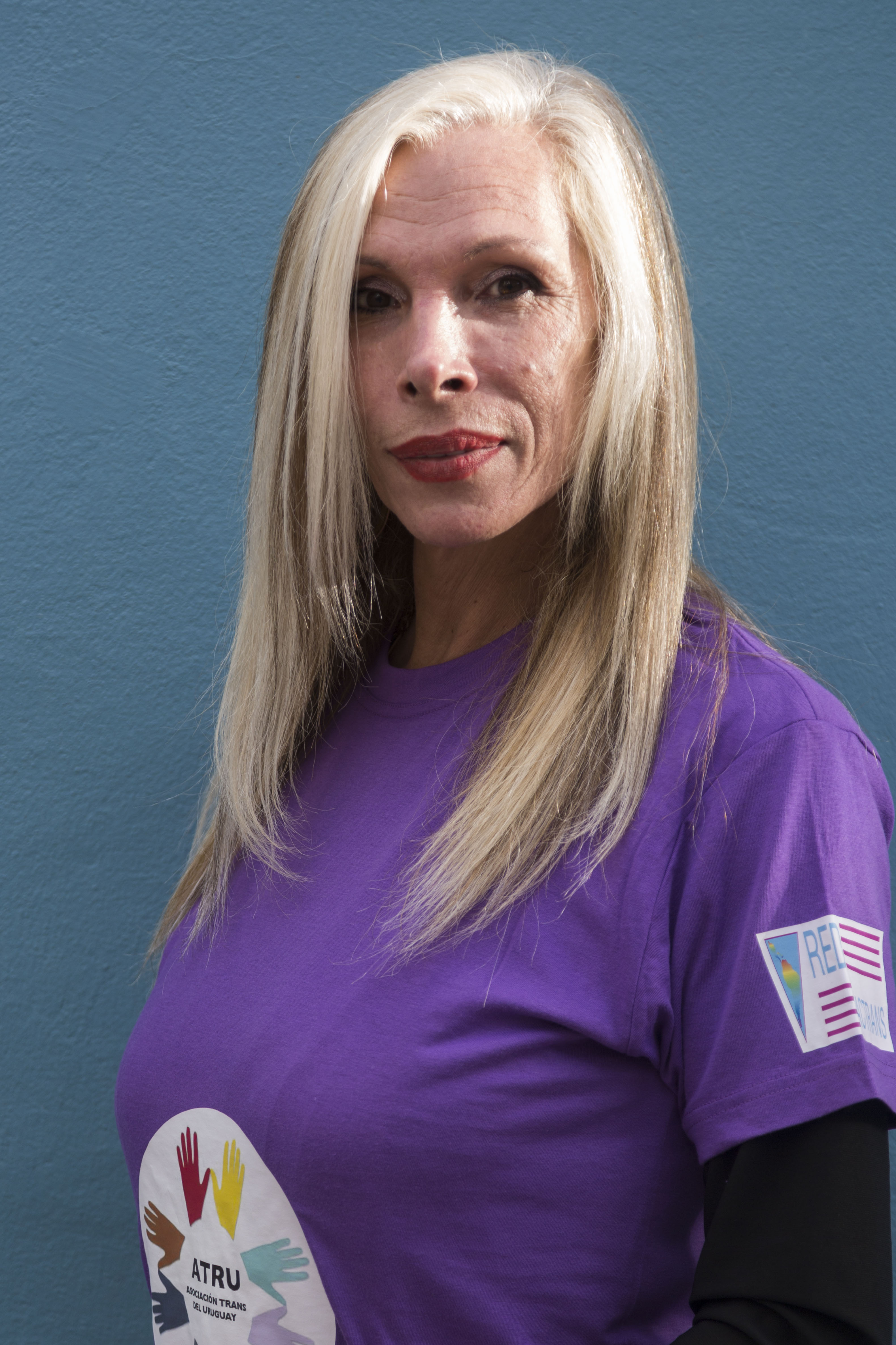 Karina Pankievich. Preparativos en la Asociación Trans de Uruguay (ATRU) para la marcha del 8 de marzo de 2019. Montevideo, Uruguay.